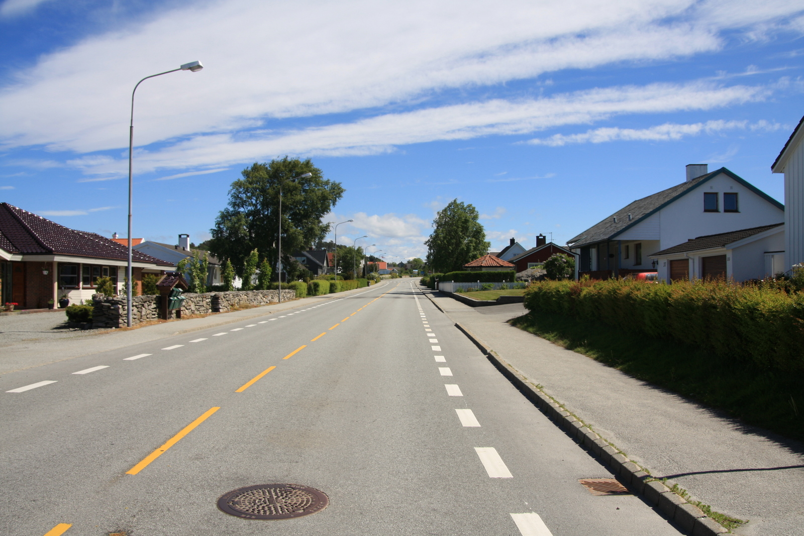 Fylkesvei 323 Austråttveien